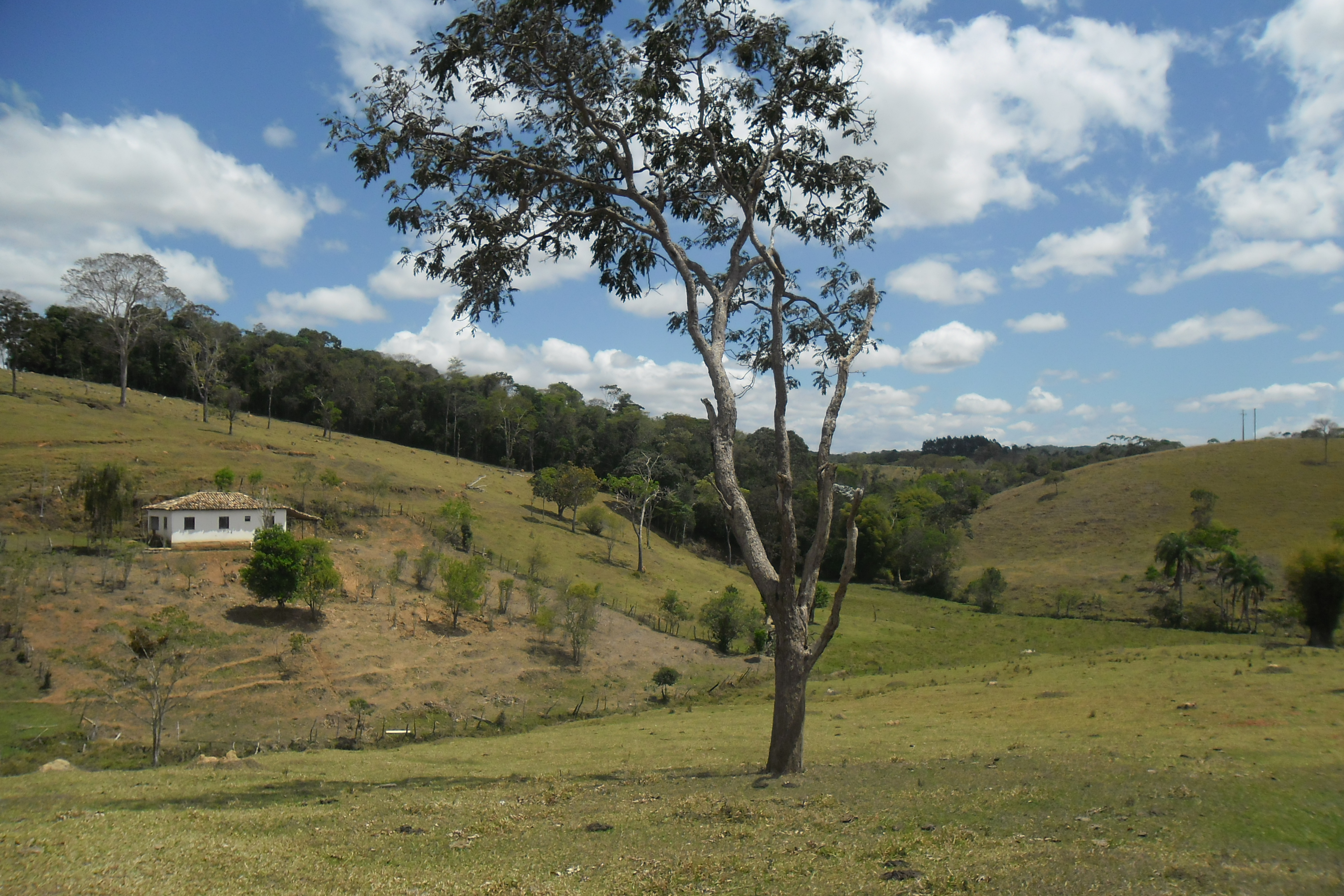 Jacarandá